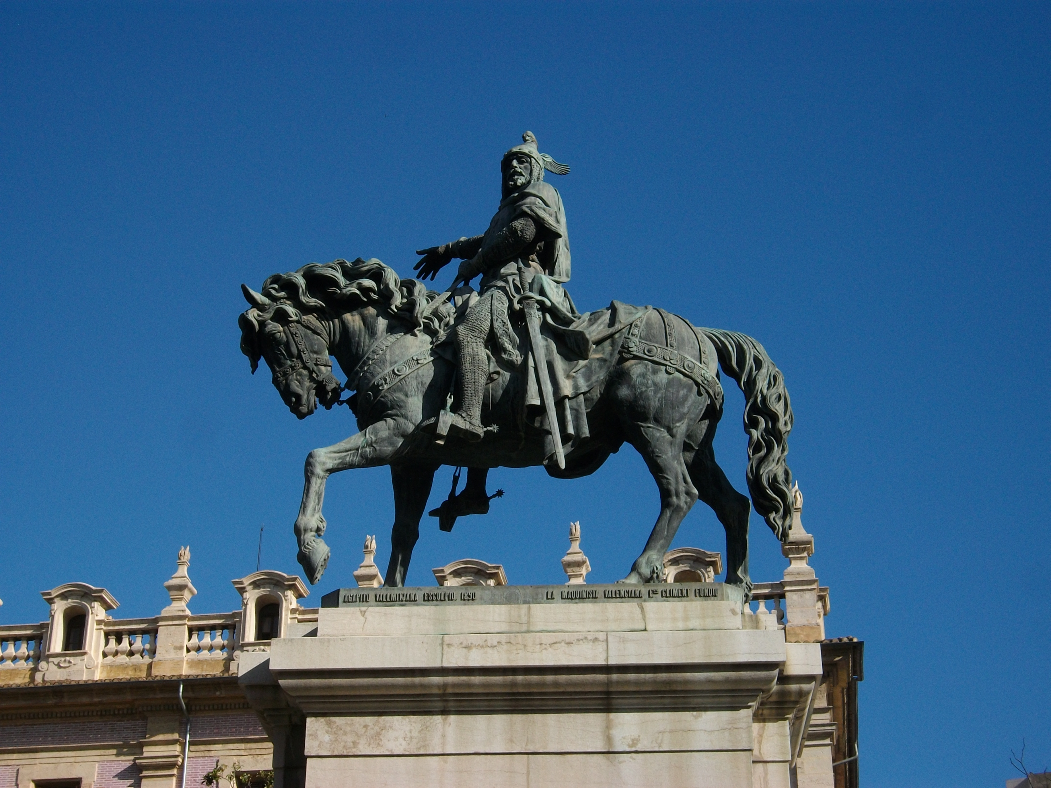 Estàtua de Jaume I a València, obra d'Agapit Vallmitjana, 1890.